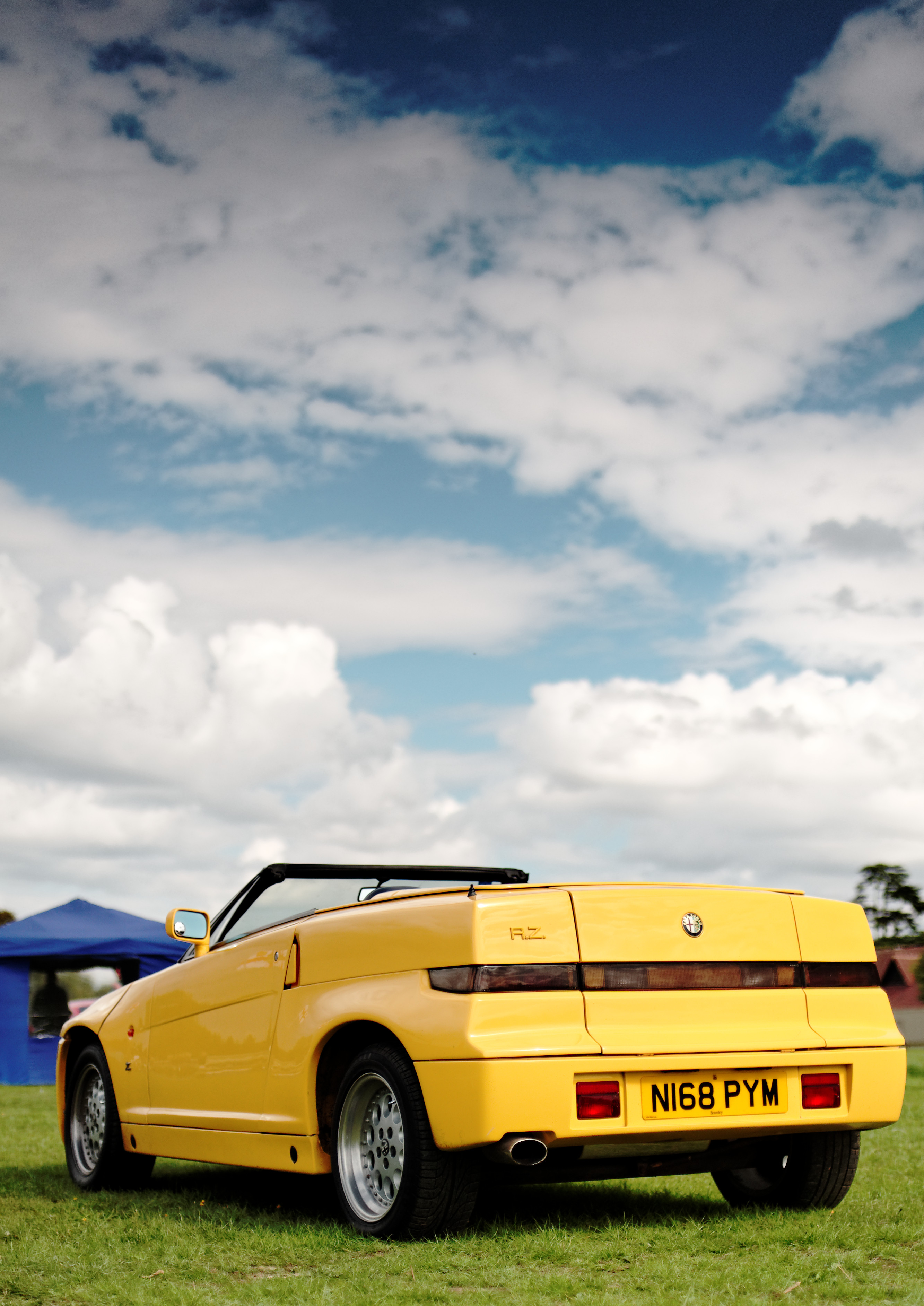 Alfa Romeo RZ